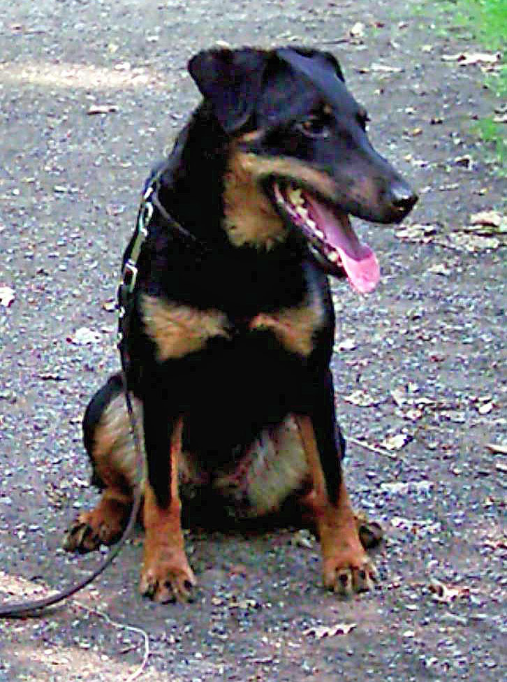 Jagdterrier "Braxa"